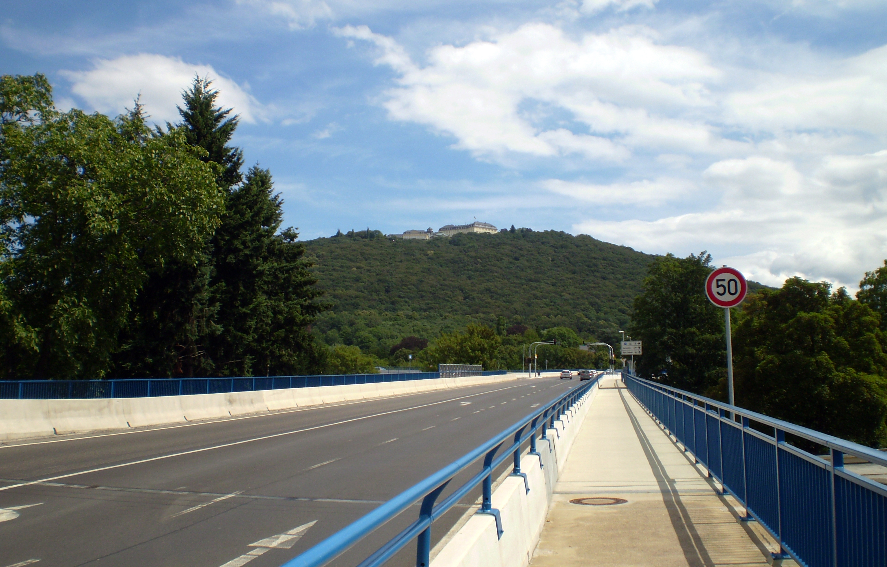 Ferdinand-Mülhens-Straße auf der Siebengebirgsbrücke, Königswinter